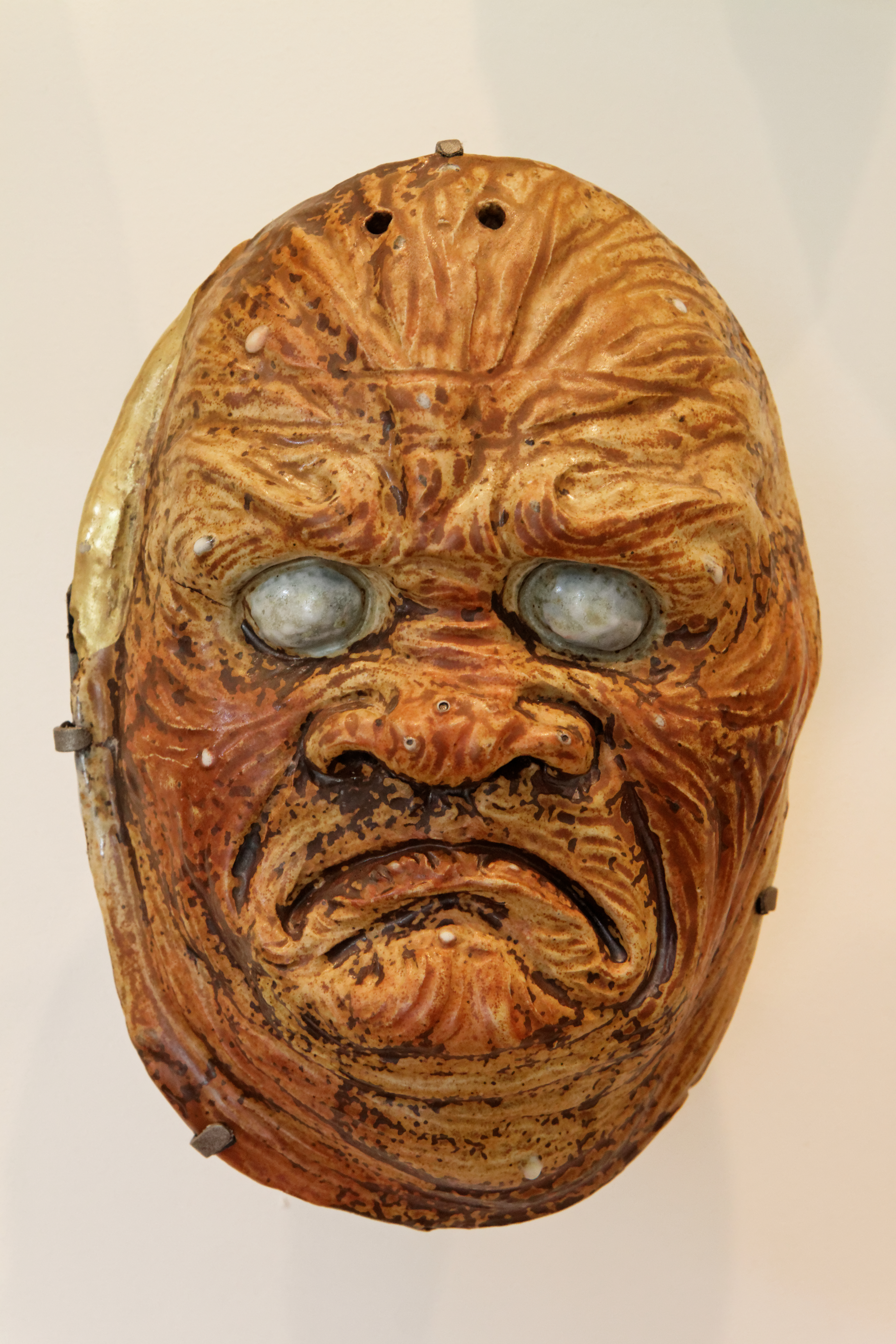 Sculpture, un masque d'horreur en grès émaillés réalisée par Jean-Joseph Carriès (1855-1894).